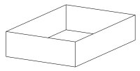 Schematische weergave van een vertikale grondkering